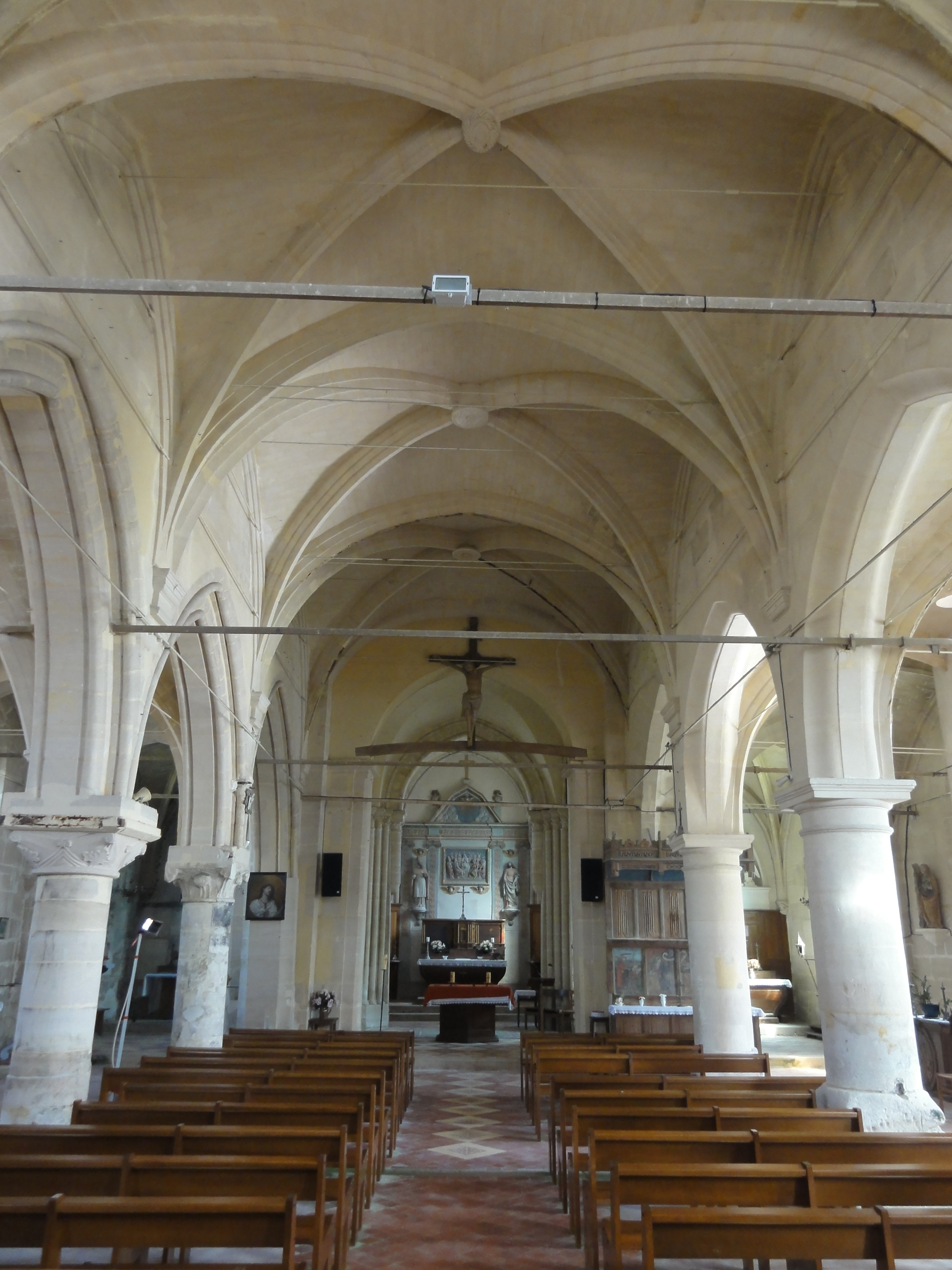 Intérieur de l'église (voir titre).